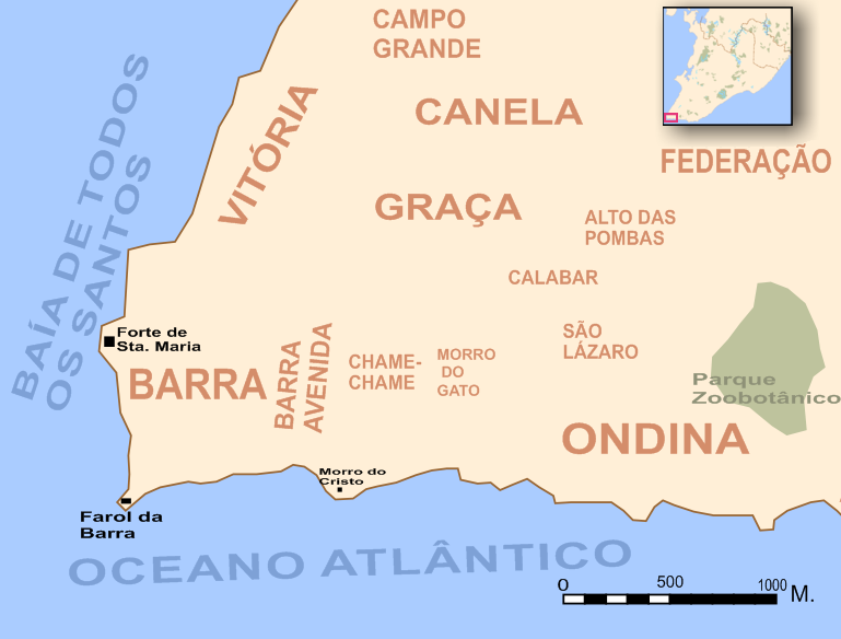 Mapa de Salvador (Bahia, Brazil) - Forte de Santa Maria, Farol da Barra e Morro do Cristo.